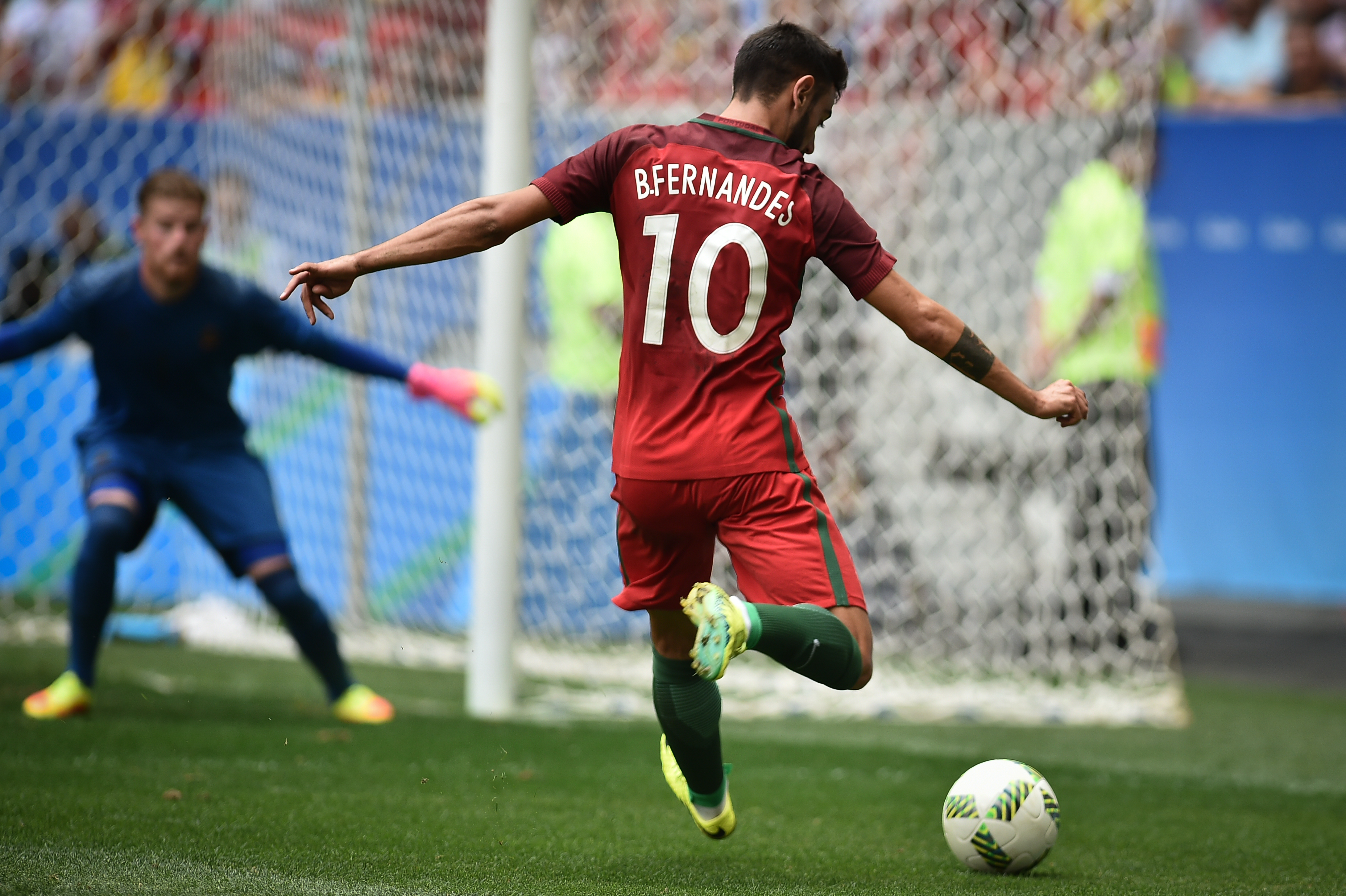 Estádio Nacional de Brasília Mané Garrincha, Brasília, DF, Brasil, 13/8/2016 Foto: Andre Borges/Agência Brasília Portigal e Alemanha jogam neste sábado (12), no Estádio Mané Garrincha, pelas quartas de final do futebol masculino nas Olimpíadas 2016.